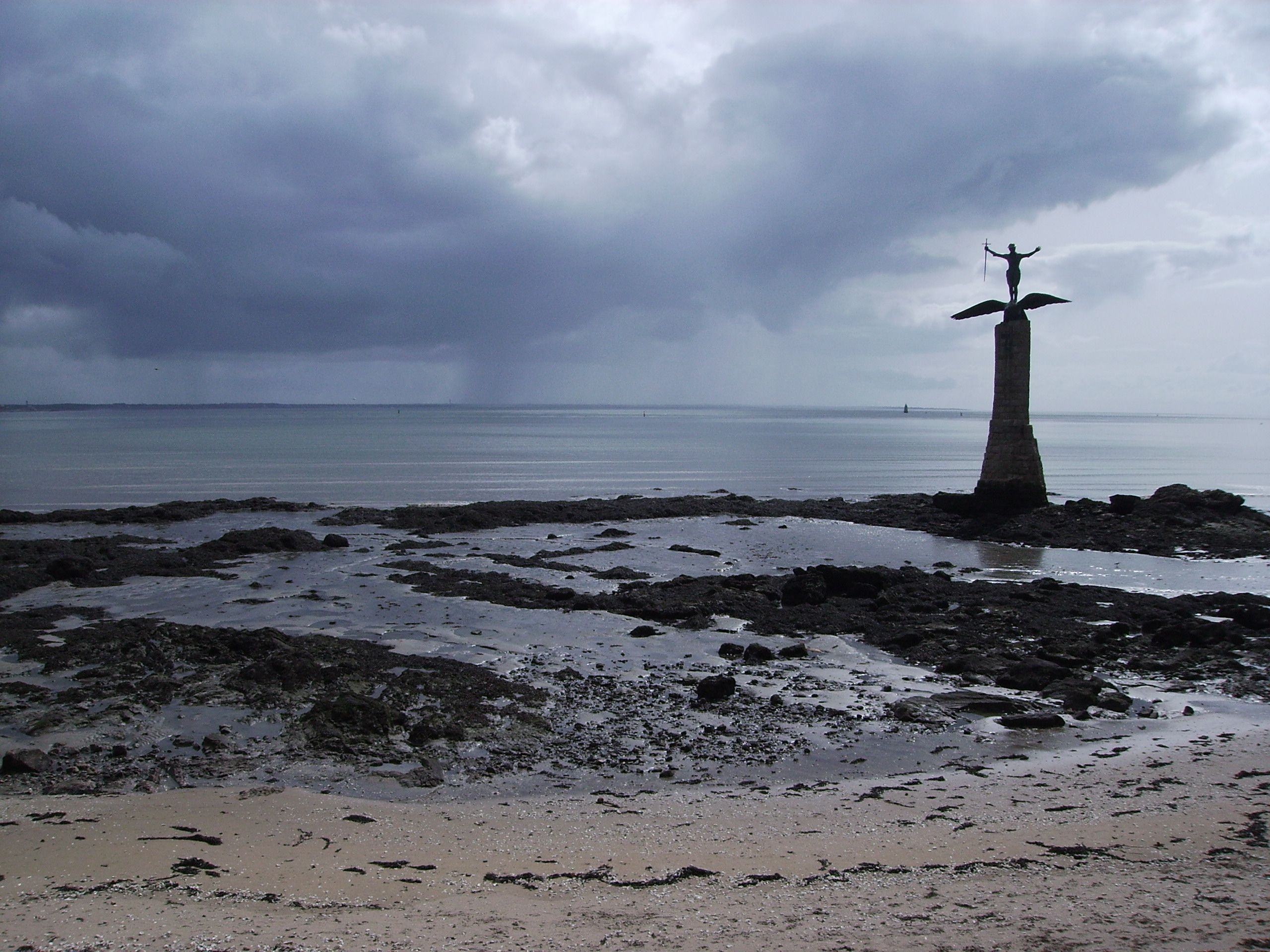 Monument au mort américain de Saint-Nazaire